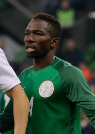 Darío Benedetto, Kenneth Omeruo